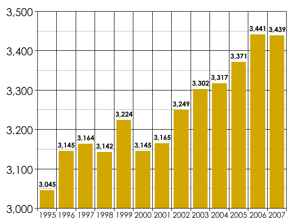 Wahania liczby ludnośći gminy Rewal w latach 1995-2007 (w zakresie od 3000-3500)